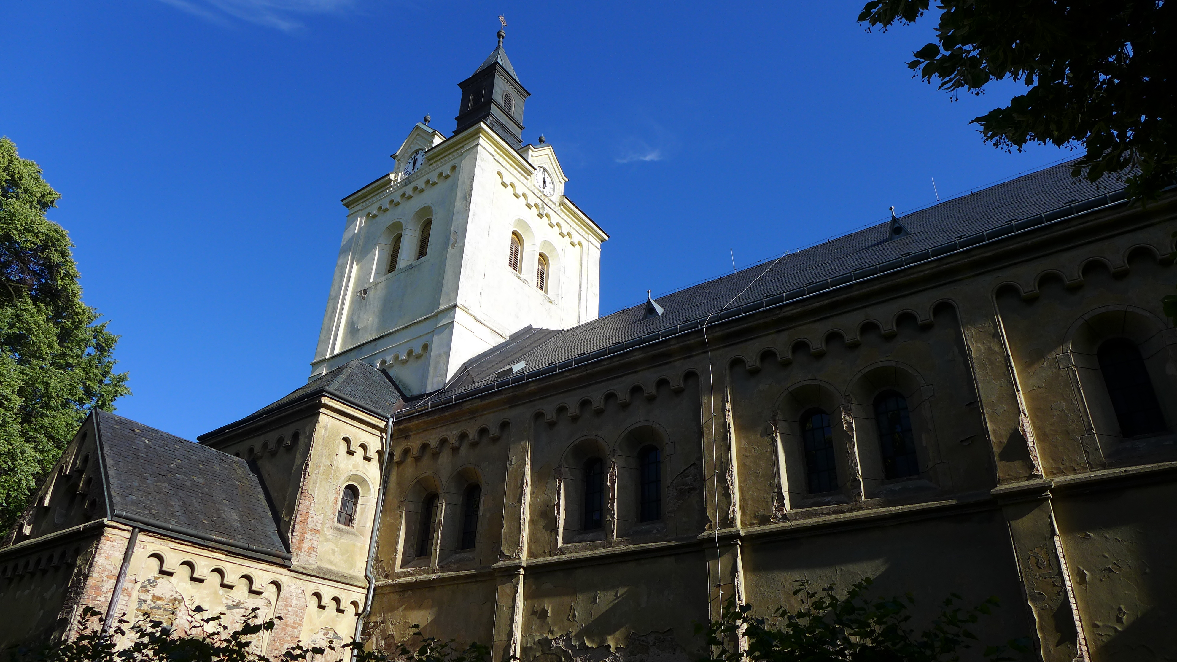 Kostel svatého Václava, náves, Nová Ves I.